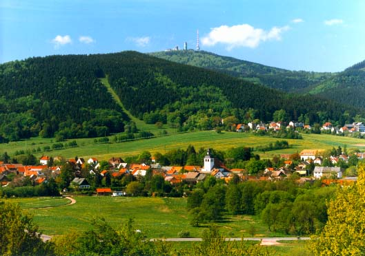 Ort Tabarz in Thüringen